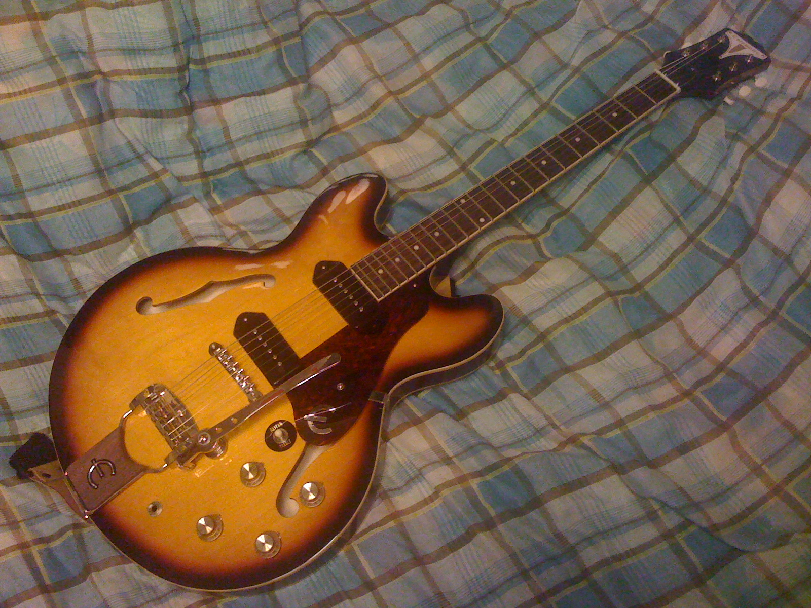 エピフォン・カジノの発売50周年記念モデル